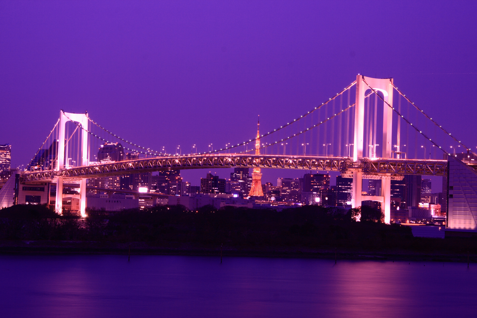 Rainbow Bridge night view